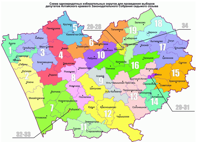 АКЗС округа